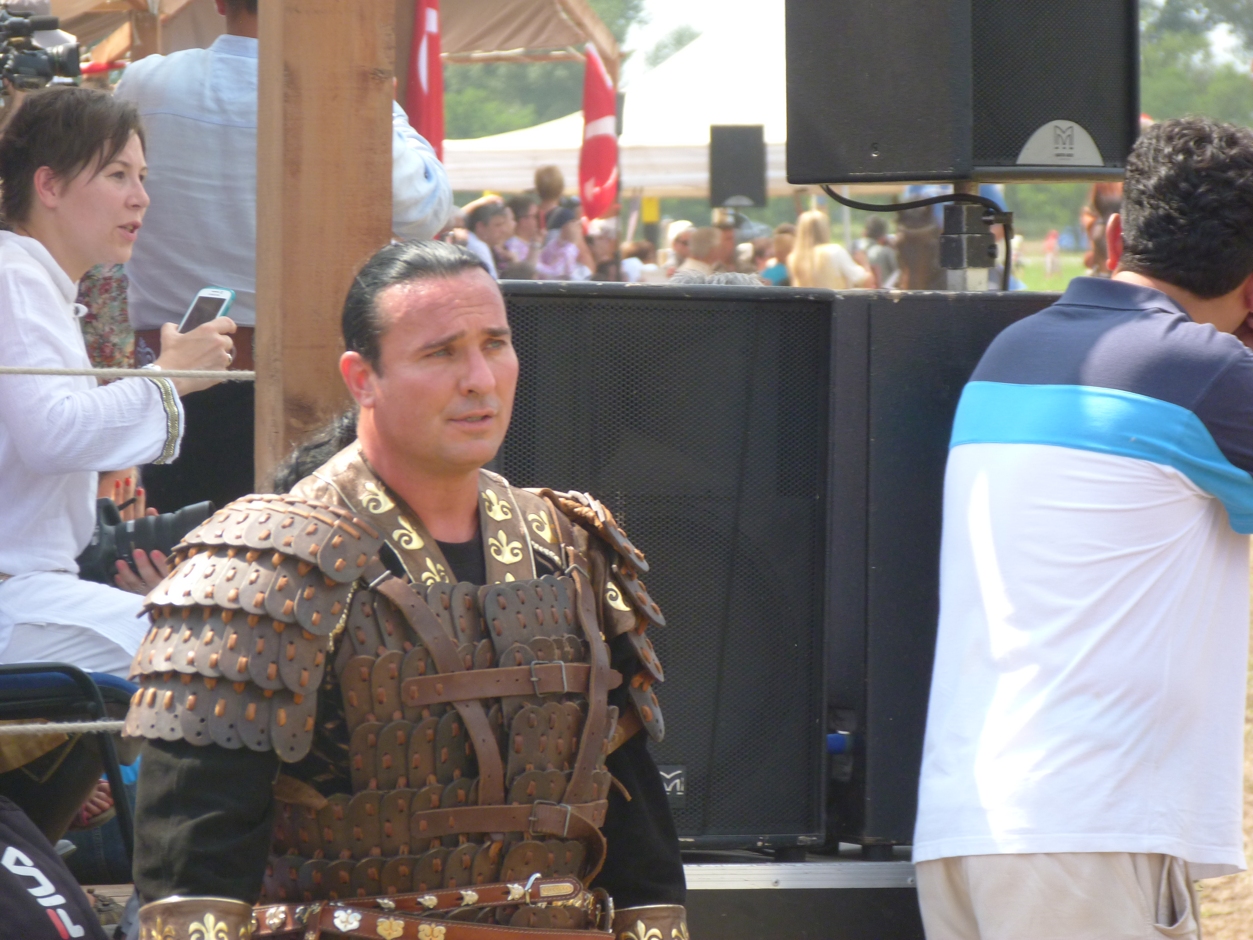 A felvétel 2014. augusztus 9-én, szombaton készült Bugacon. Kurultáj - Magyar Törzsi Gyűlés, melyet 5. alkalommal rendeztek meg. Bíró András Zsolt főszervező. 2006 szeptemberében Bíró András Zsolt antropológus, humánbiológus vezetésével öt fős kazak-magyar kutatócsoport több mint egy hónapos expedíció keretében járta be az észak-kazahsztáni Torgaj-vidék területét (Kosztunaj-tartomány, Dzsangeldi-megye), és a kutatás genetikai kapcsolatot mutatott ki a mai magyarság és az említett területen élő madjar törzs (ejtsd: magyar, más néven „torgaji magyarok”) között. Az eredményekről az American Journal of Physical Anthropology tudományos szakfolyóirat is beszámolt. 2006 decemberében a madjarok vezetői Bíró Andrást is meghívták első közös megbeszélésükre Kazahsztánba, ahol úgy döntöttek, hogy létrehoznak egy alapítványt és a következő évben összehívják a Kurultájt, a madjarok törzsi gyűlését. Címkék: Eurasian puszta Puszta Puszta öv Puszta belt Bíró András Zsolt Torgaj Dzsangeli megye Kurultáj Magyar Törzsi Gyűlés 2014-08-09 Magyarok Világszövetsége Magyar-Turán Alapítvány Turán népei Lezsák Sándor (2010: Bugac), (2014: Bugac) Források: Nagy-Kurultáj